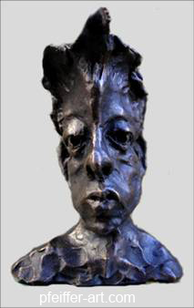 Nikolaus Pfeiffers bekanntestes Werk, die Bronzebüste von Egon Schiele im Leopold Museum Wien